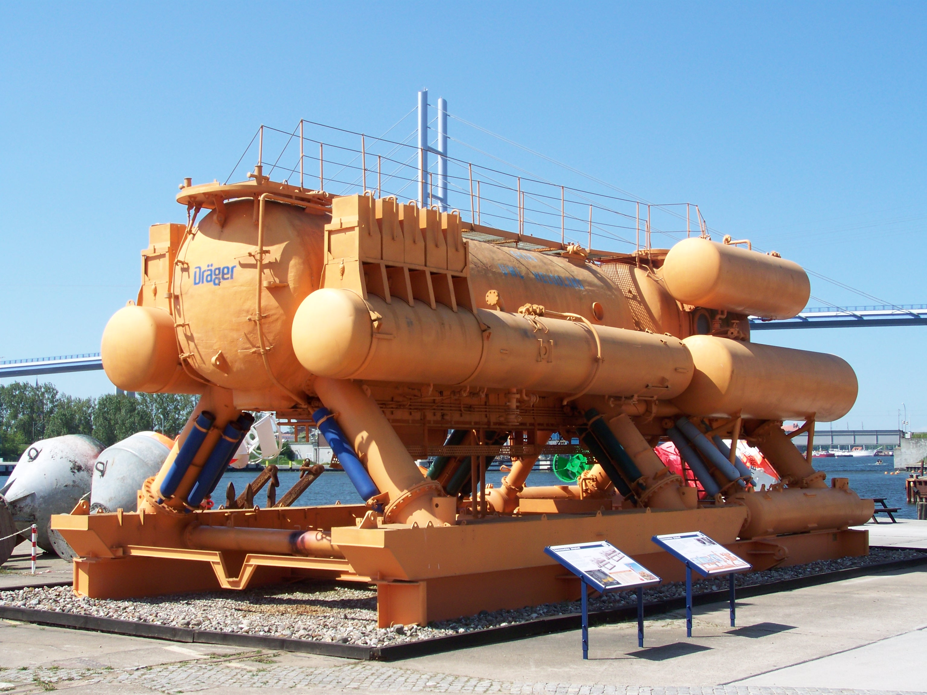 UWL Helgoland im Nautineum Dänholm, Stralsund, Ansicht (2008-05-10)